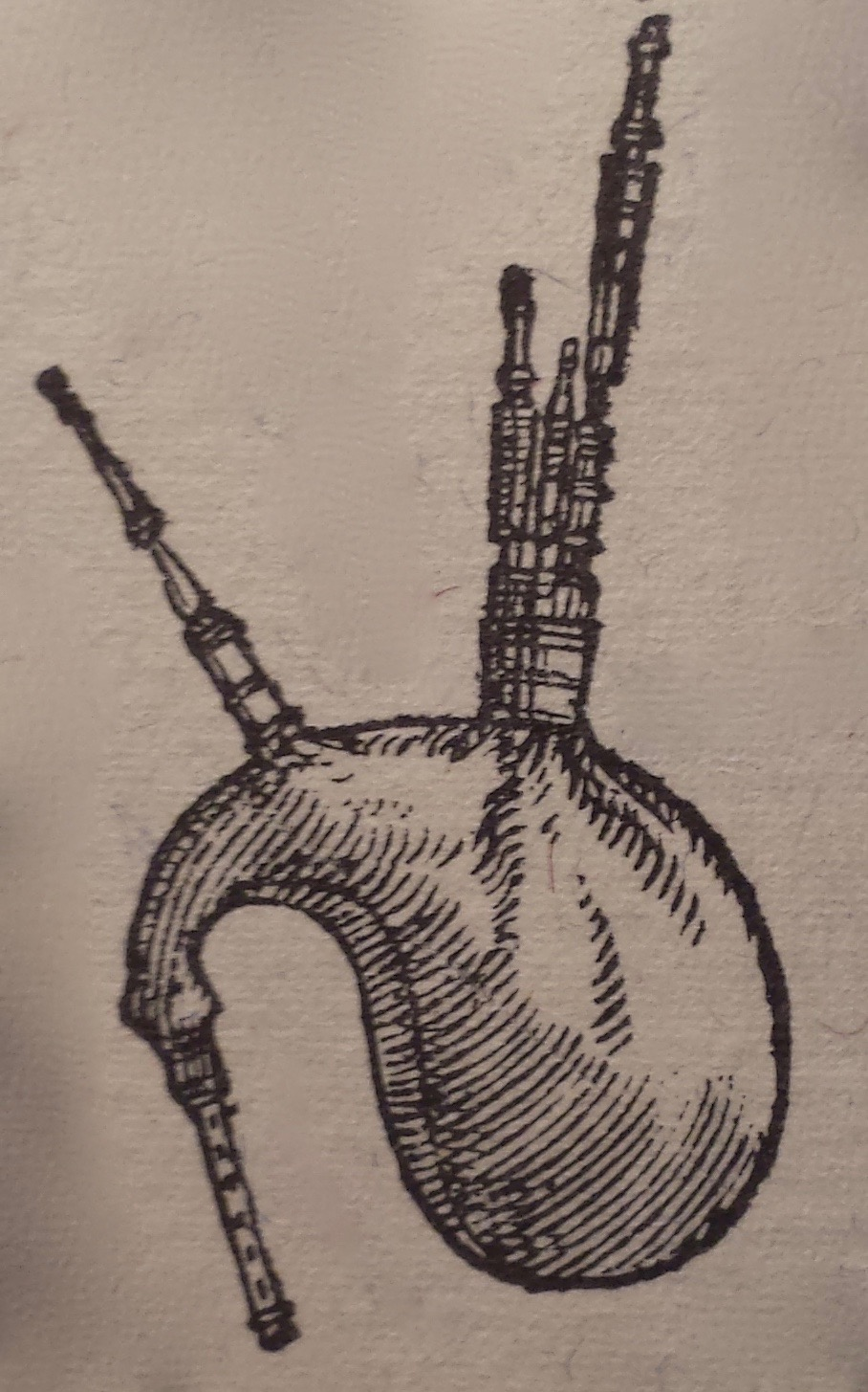 Dudey